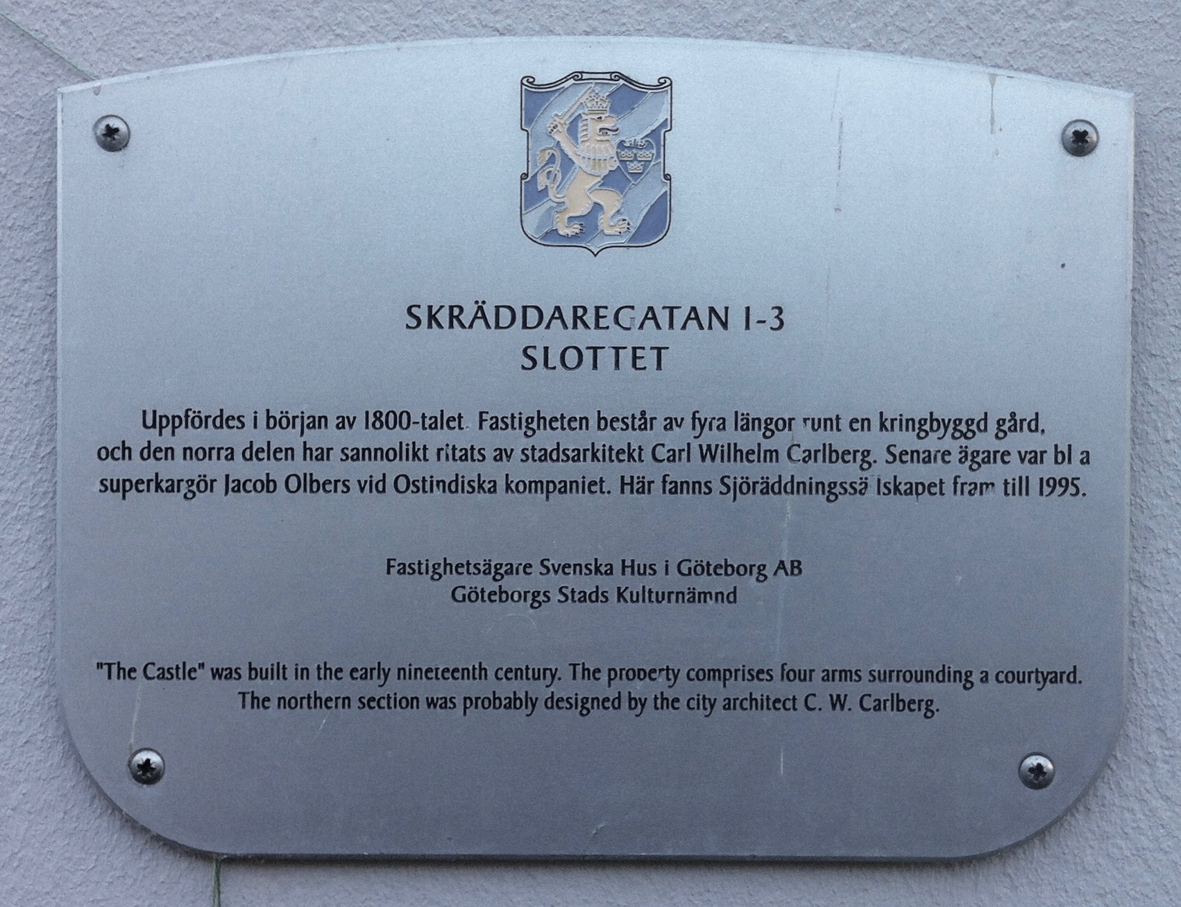 Plakett, Ahlbergska huset, Skräddaregatan i Göteborg. Plaketten sattes upp som en del av Göteborgs stads kulturnämnds "Projekt Husmärkning" kring åren 2000-2001 där drygt etthundra skyltar ingick. Se även boken "100 utmärkta hus i Göteborg". Vid en inventering av kommunen gjord 2016 satt 69 skyltar fortfarande uppe.